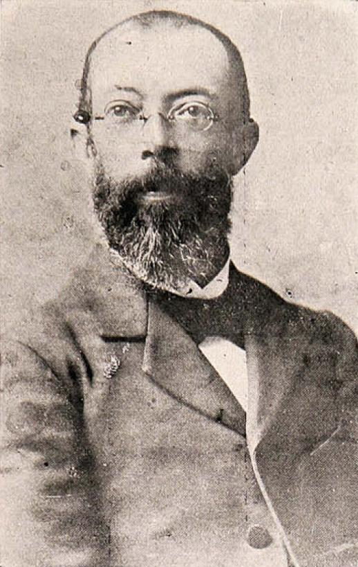 "D. Ismael Valdés Vergara, Presidente del Comité de Defensa de la Junta de Reforma Municipal de Santiago". Ismael Valdés Vergara (Santiago, 14 de julio de 1853 - ibídem, 24 de noviembre de 1916) fue un abogado, bombero, diputado y alcalde chileno